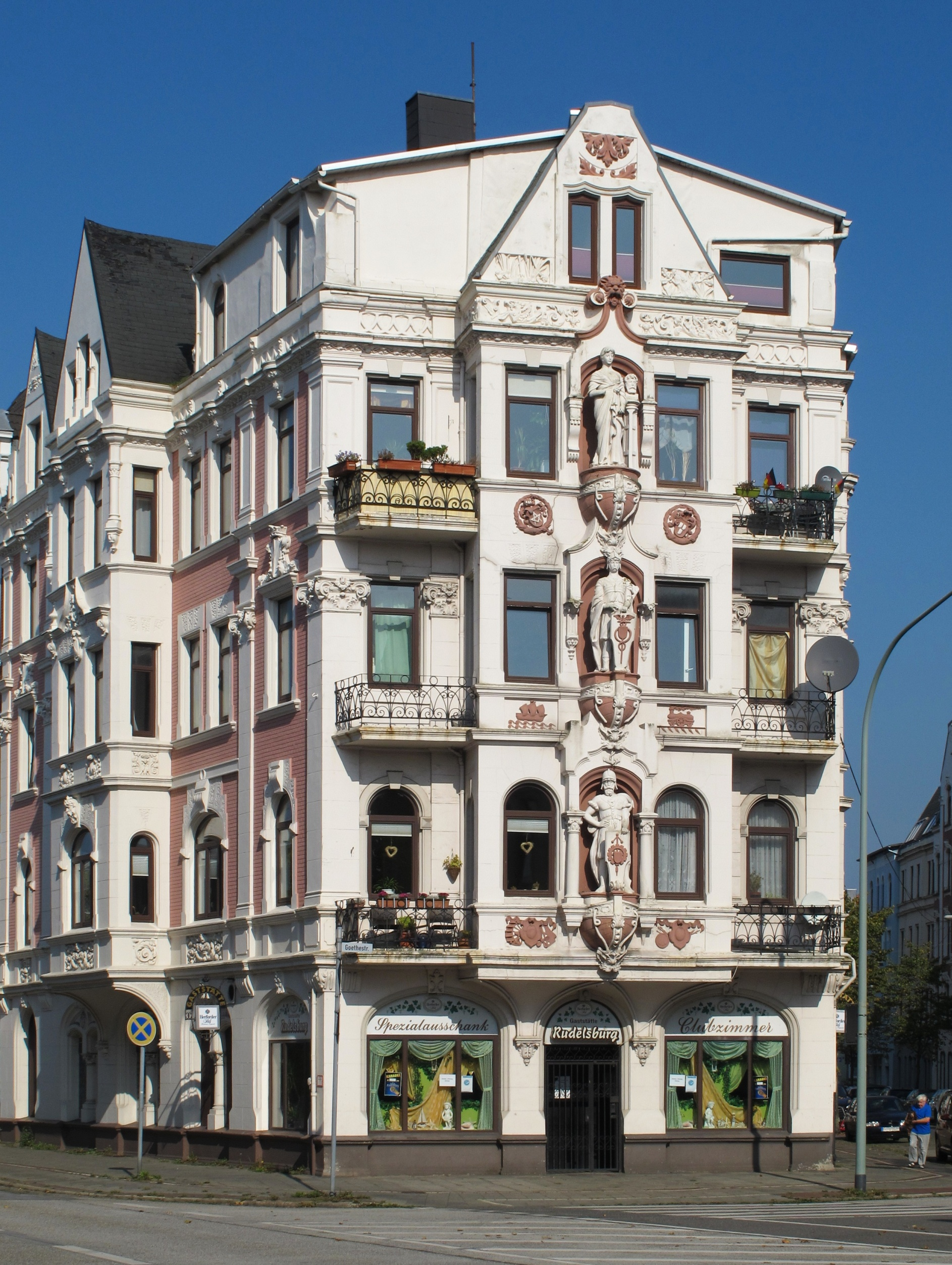 Rudelsburg in Bremerhaven, Goethestraße 1 Das abgebildete Objekt ist ein geschütztes Kulturdenkmal in der Freien Hansestadt Bremen, mit der Nr. 1692 beim Landesamt für Denkmalpflege registriert.